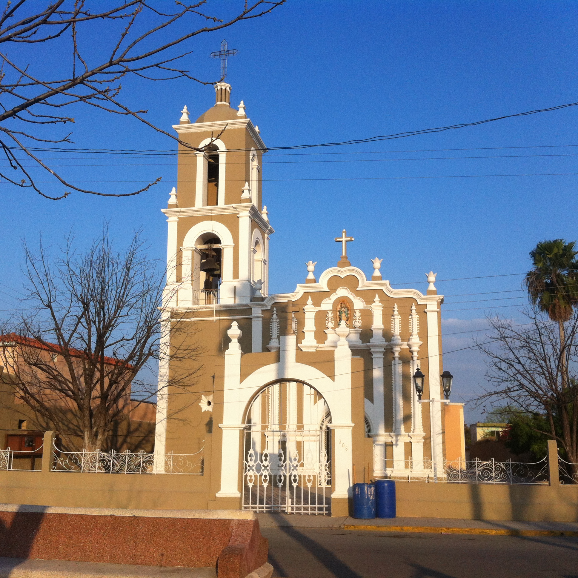 Centro de Carmen, Carmen, N.L., Mexico